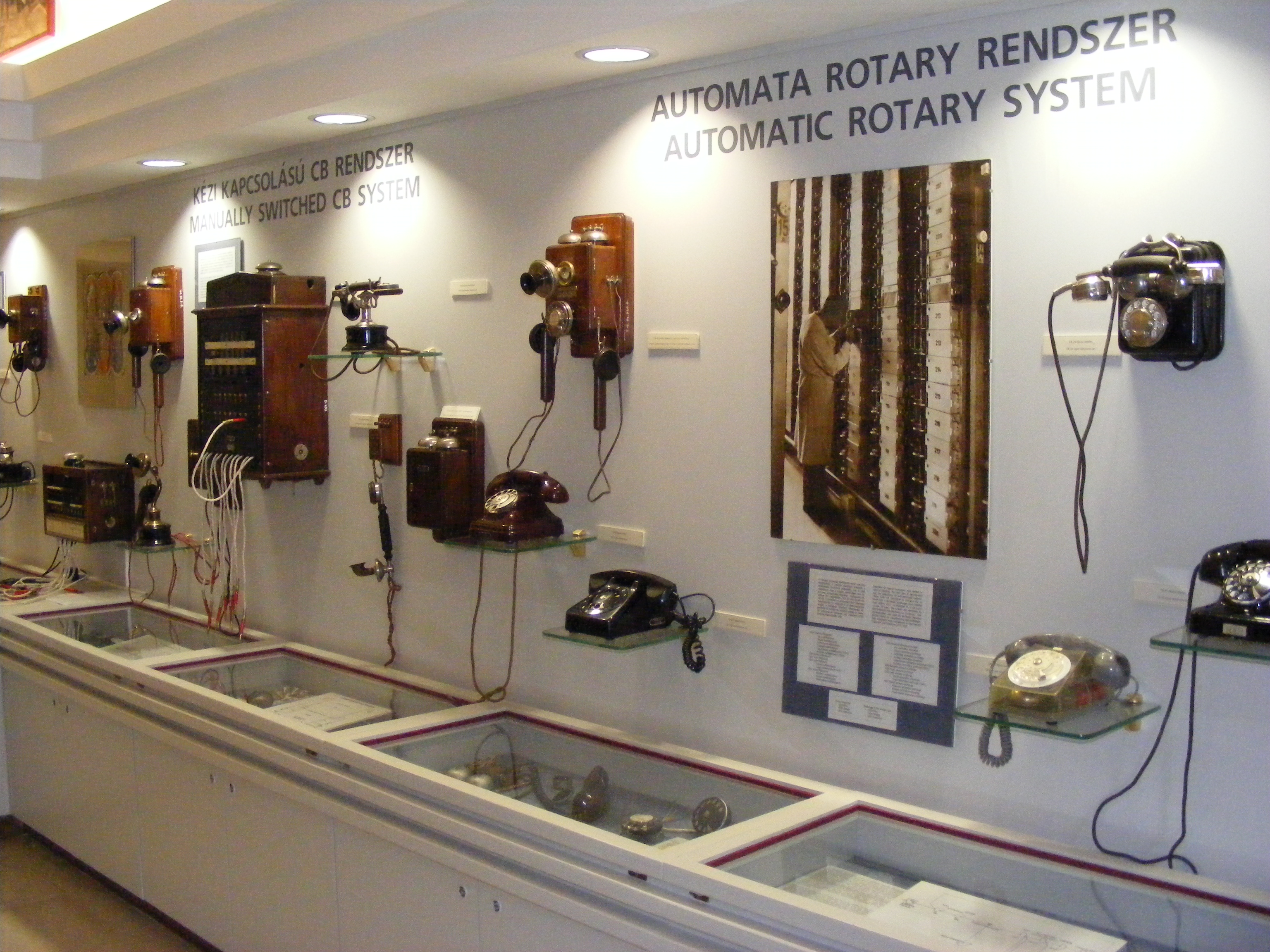 Vidindaĵoj en la Muzeo